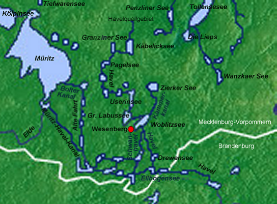 the lake "Woblitzsee" in Mecklenburg (Germany) - der Woblitzsee bei Wesenberg in Mecklenburg